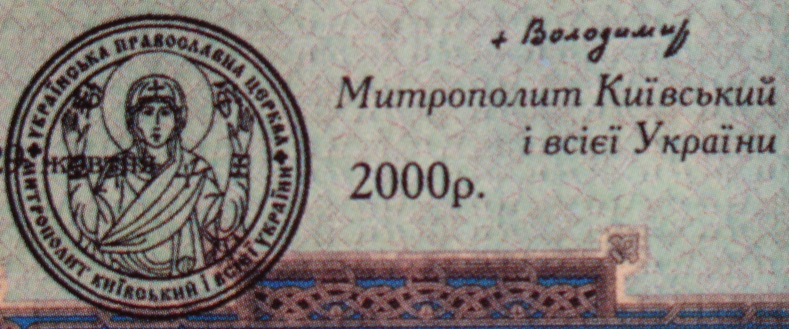 Подпись Митрополита Владимира (Сабодана) под указом о награждении митрополита Никодима (Руснака).